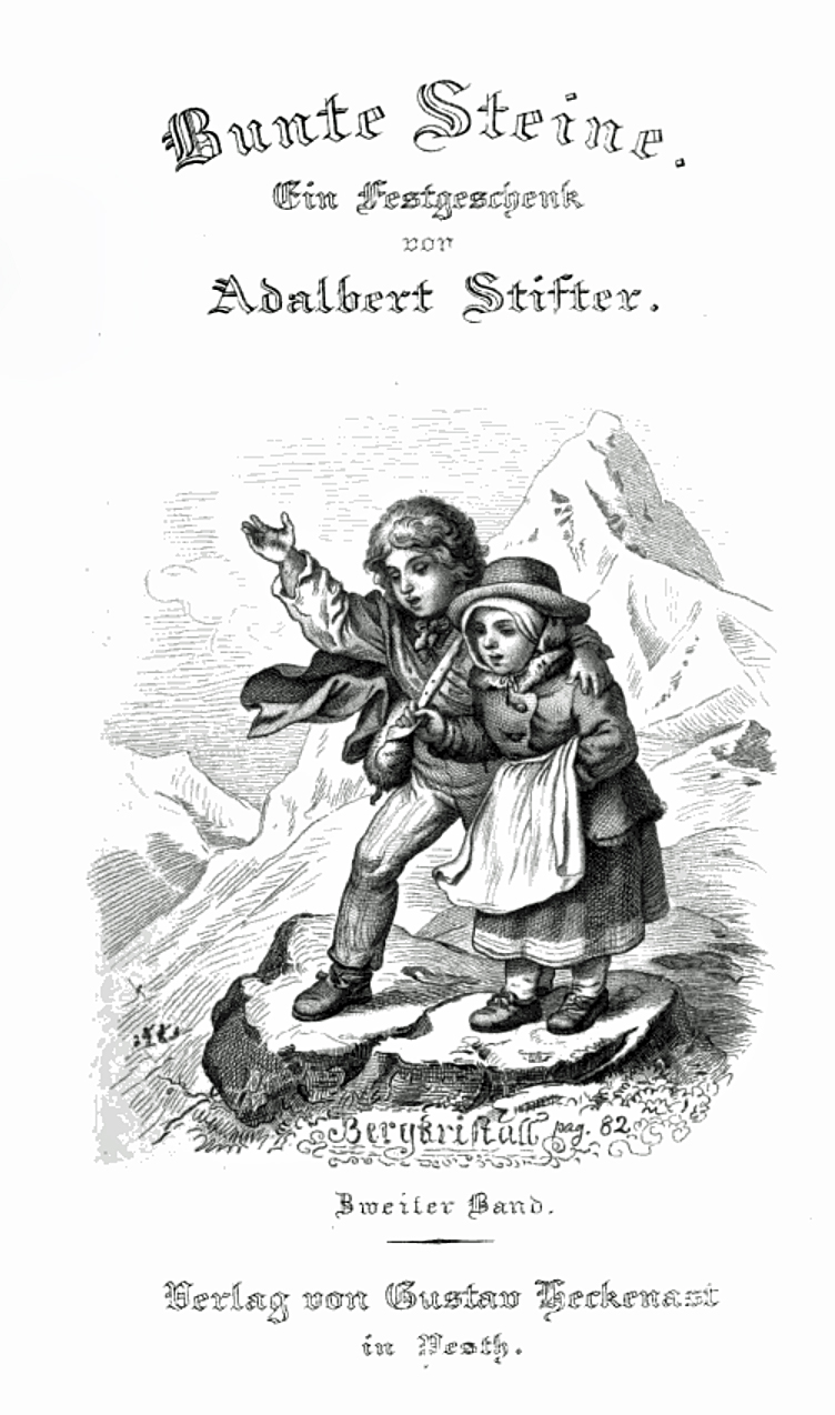 Frontispiz des zweiten Bandes von Stifters Bunte Steine. Es zeigt eine Szene aus der Erzählung Bergkristall